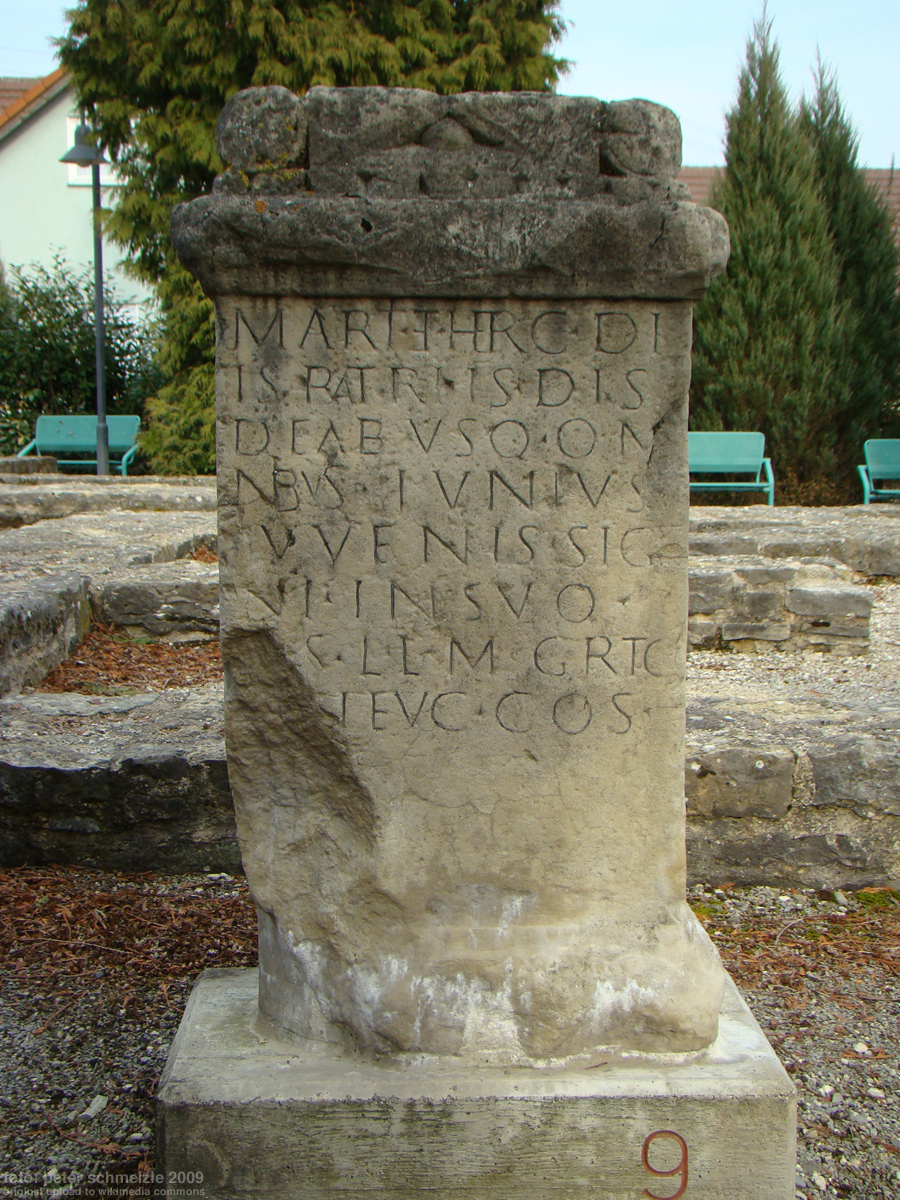 Weihestein des Iunius Iuvenis aus dem Jahr 221 n. Chr.; im antiken Jagsthausen. Kopie im Römerbad Jagsthausen.